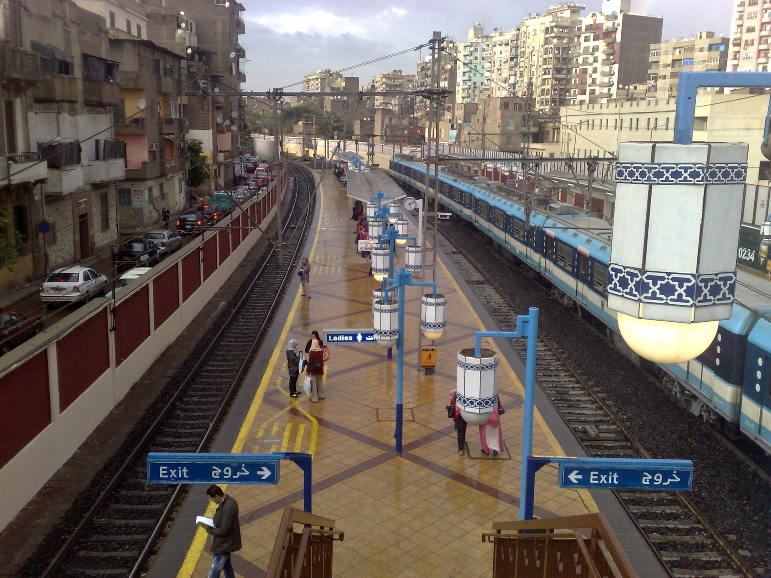 محطة قطارات أنفاق السيدة زينب، القاهرة